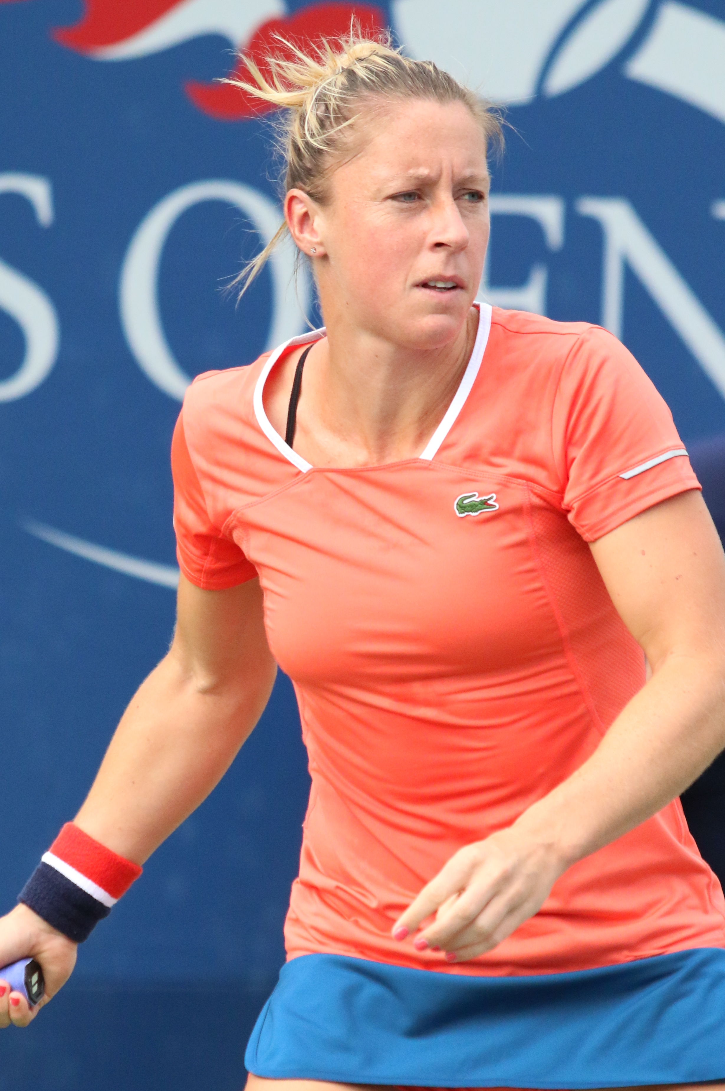 Parmentier US16 (5)